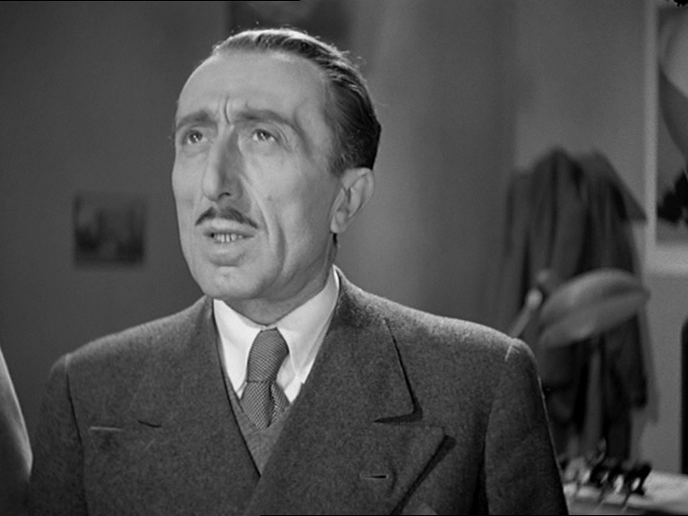 Scena dal film La fortuna viene dal cielo